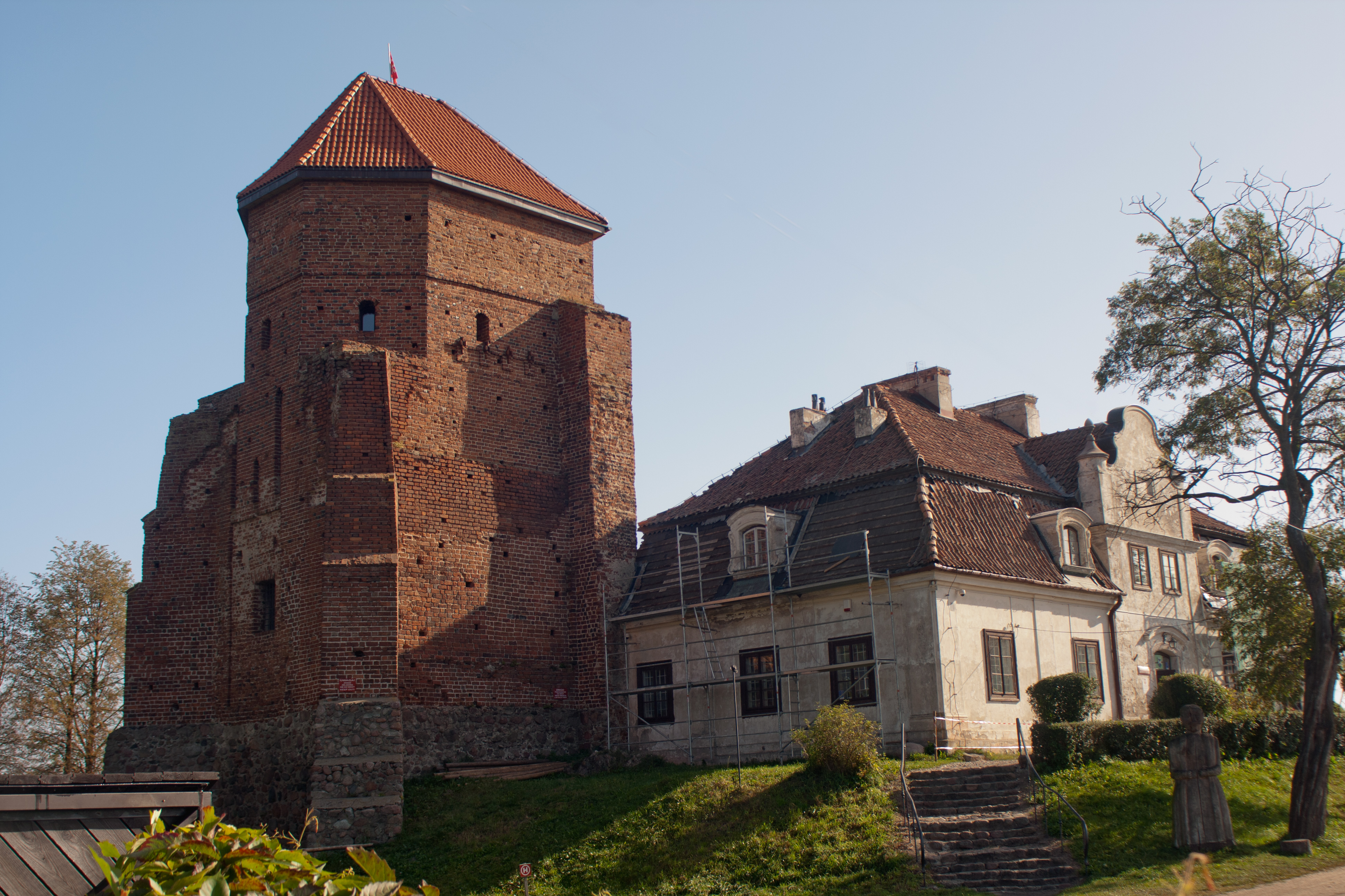 Liw, zespół zamkowy, ob. muzeum, XV-XX: pozostałości „domu większego” wieża bramna pozostałości muru kurtynowego kancelaria starostwa, XVIII